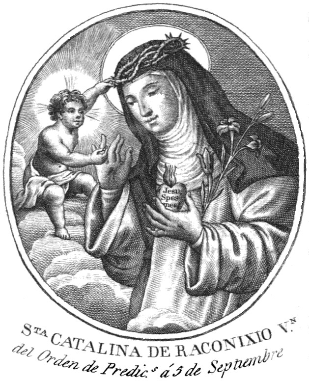 image de la bienheureuse Catherine de Racconigi, (1486-1547)